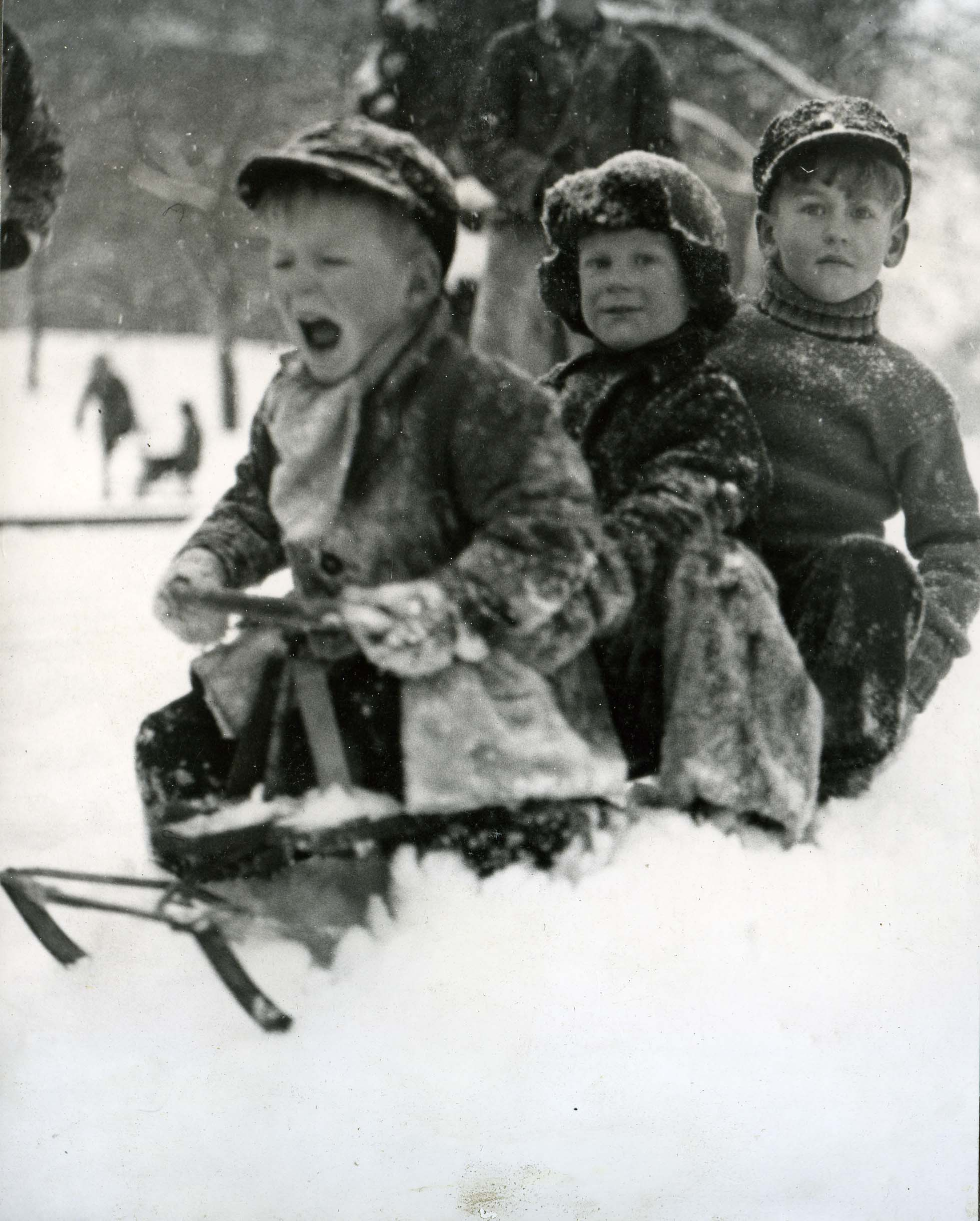 Kälkbacksåkning på dåvarande Kronoberget (Kronobergsparken).